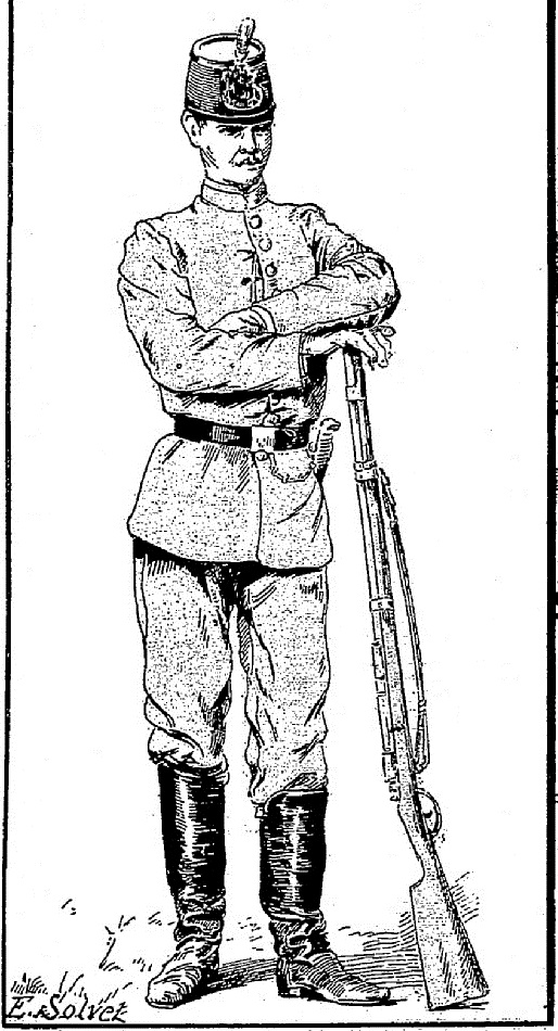 La Révolution a Buenos-Ayres.— Soldat d'infantarie